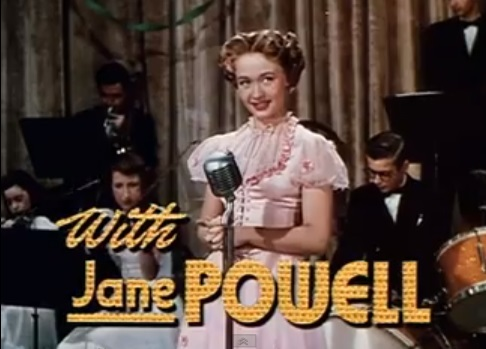 Imagem do trailer do filme A Date with Judy (1948). Os trailers dos filmes publicados antes de 1964 nos Estados Unidos são de domínio público.